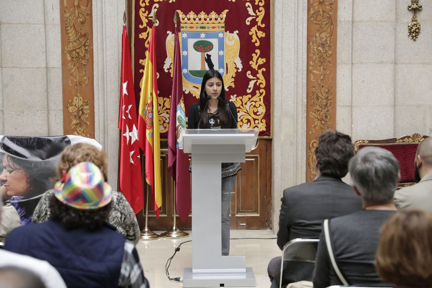 “Defender los derechos del pueblo fue la tarea permanente de Berta Cáceres durante toda su vida, por eso es una gran alegría para mí poder estar hoy aquí”. Con estas palabras Mauricio Valiente, el tercer teniente de alcalde del Ayuntamiento de Madrid, comenzaba el acto homenaje que el consistorio ha organizado en reconocimiento a esta mujer indígena lenca, feminista, y una de las defensoras de derechos humanos y ambientales más reconocidas en Honduras, cuando se ha cumplido el primer aniversario de su asesinato, ocurrido el 3 de marzo de 2016 en La Esperanza (Honduras). En el homenaje ha estado presente Laura Zúñiga Cáceres, una de sus hijas y también activista medioambiental, y diversos miembros de asociaciones latinoamericanas y españolas que trabajan en la defensa de los derechos humanos. También han asistido al acto la portavoz municipal, Rita Maestre; la delegada de Medio Ambiente y Movilidad, Inés Sabanés, así como diversos miembros de la corporación municipal de los diferentes grupos políticos.